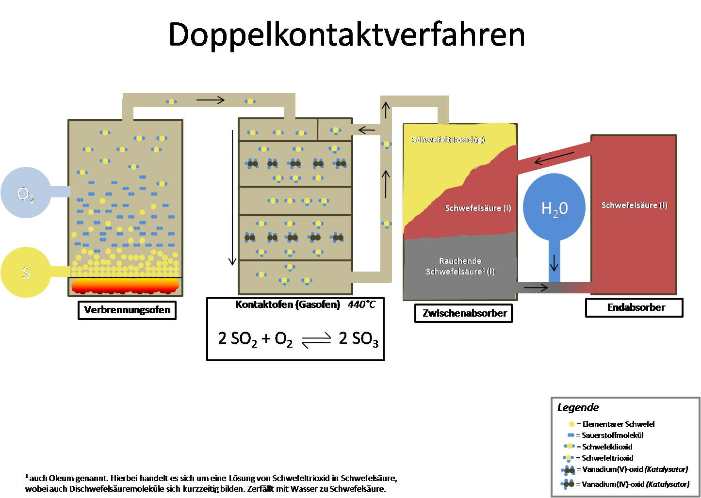 Dieses Bild stellt das Doppelkontaktverfahren da.